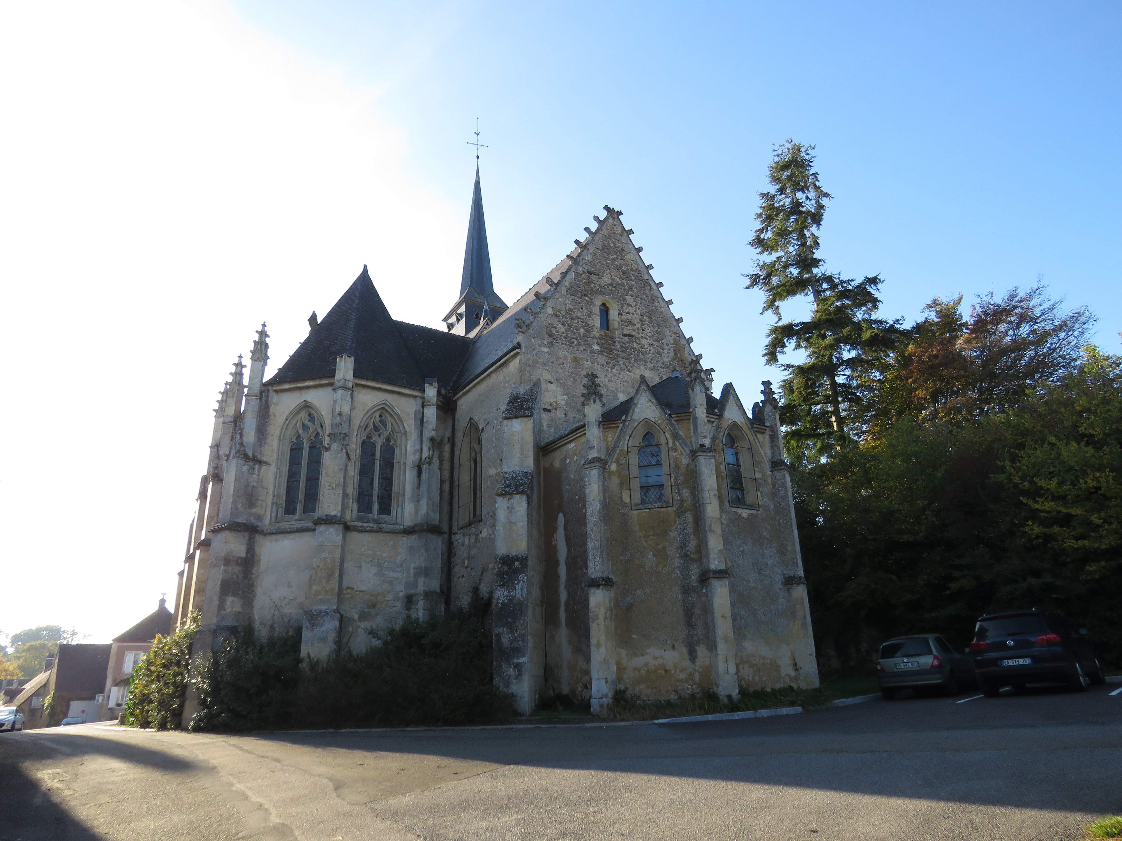 Église